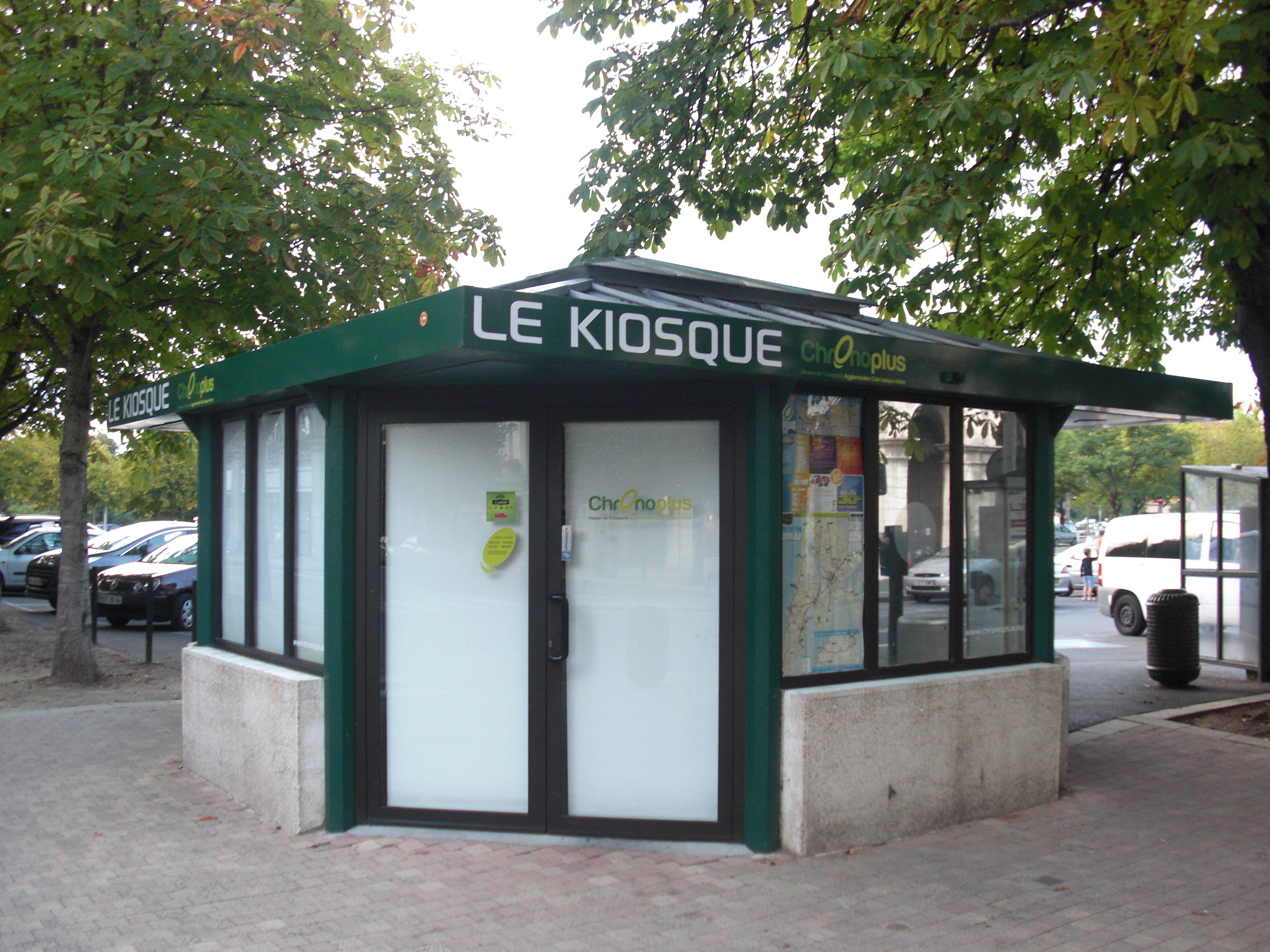 "Le Kiosque", boutique commerciale de Chronoplus derrière la mairie de Bayonne.